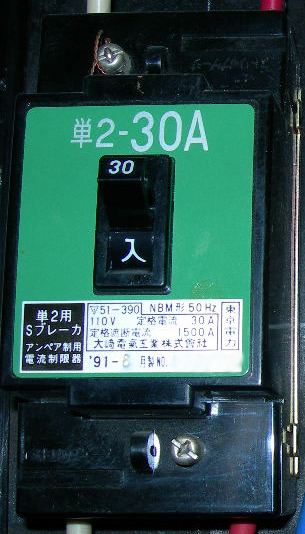 東京電力のアンペアブレーカー（電流制限器）、大崎電気工業製、単相2線式用。